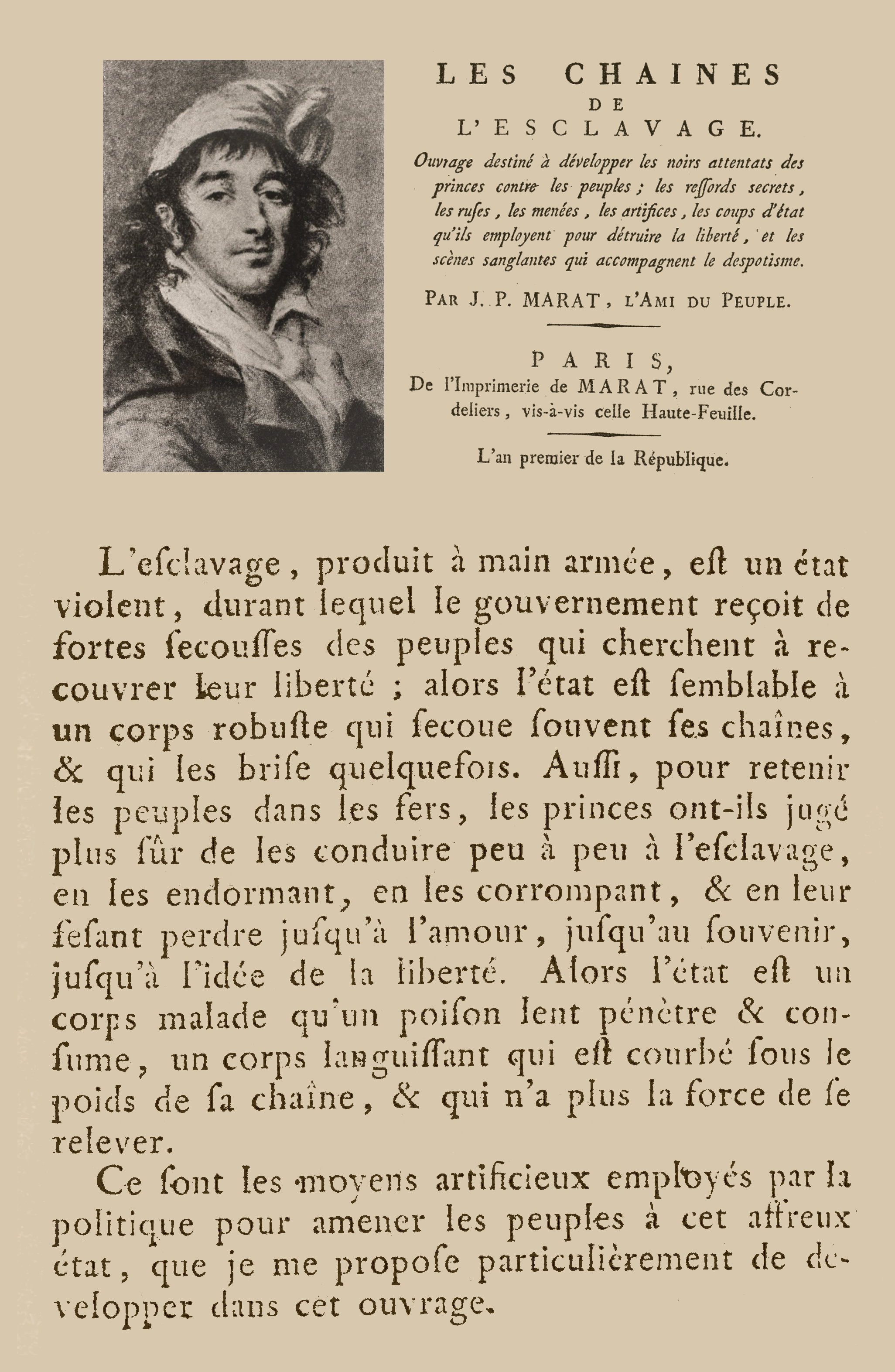 Les Chaines de l'esclavage : ouvrage destiné à développer les noirs attentats des princes contre les peuples, 1793, Titre & objet. Image dérivée.